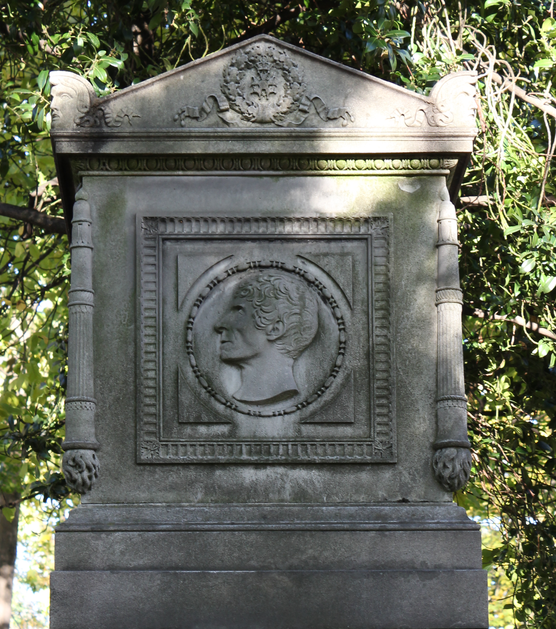 Médaillon